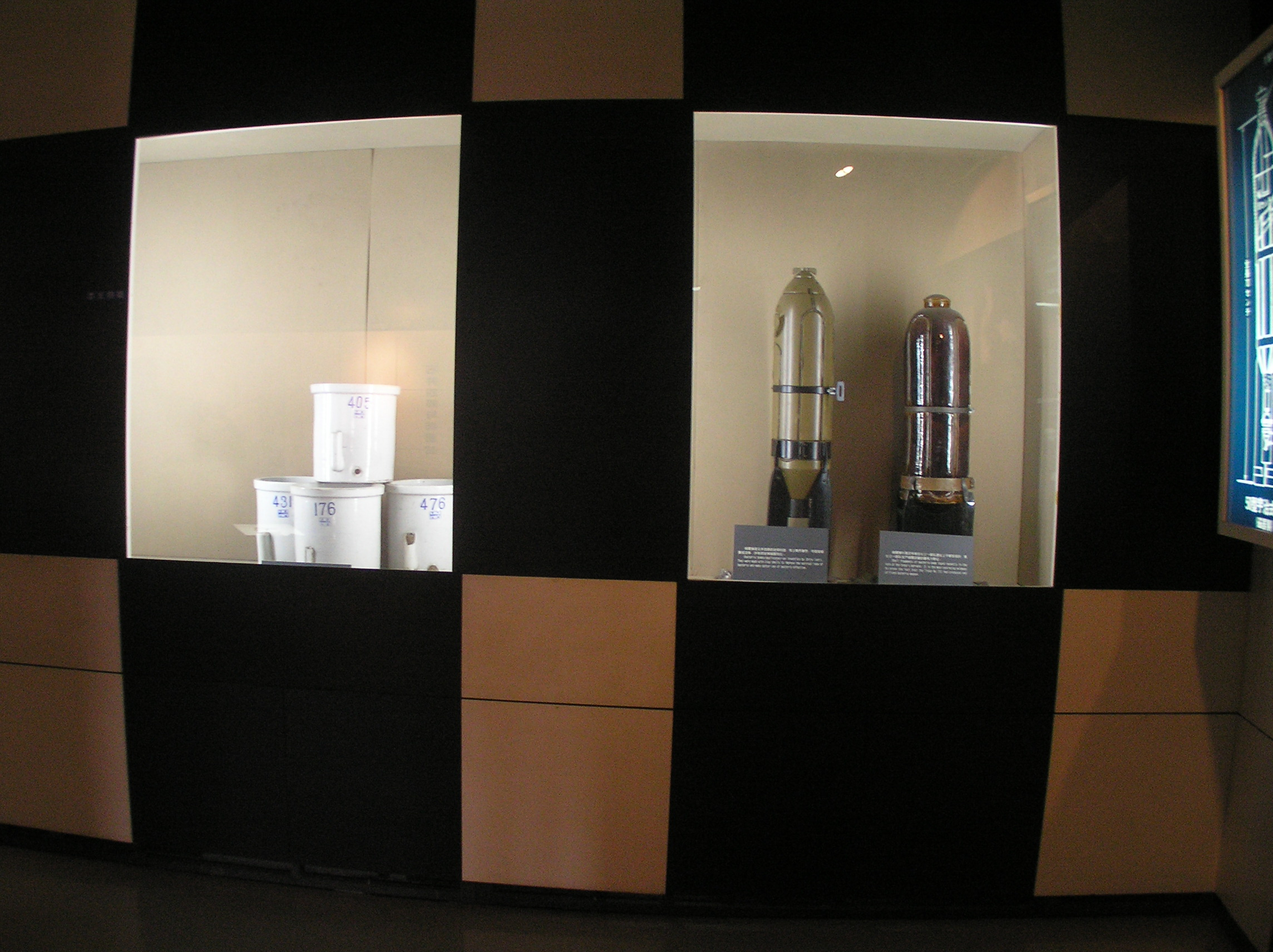 Building on the site of the Harbin bioweapon facility of Unit 731 関東軍防疫給水部本部731部隊（石井部隊） 日軍第731部隊旧址